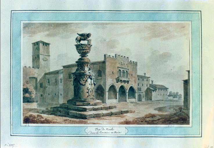 Charles-Louis Clérisseau, Vista di Noale nei territori di Venezia (1760)